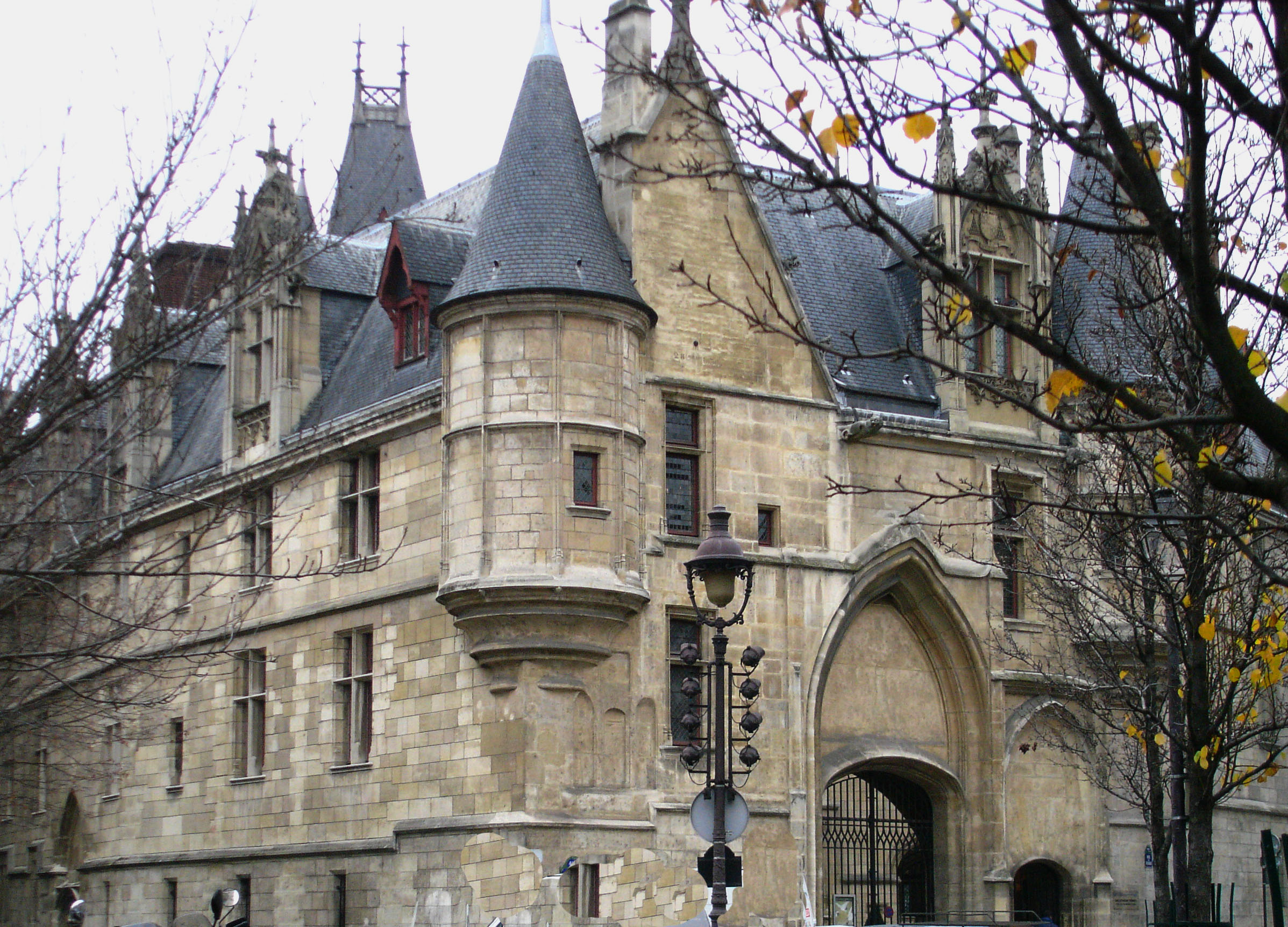 Paris, Marais, Hotel des Sens, un des palais que j'aime beaucoup en face de l'ile Saint Louis